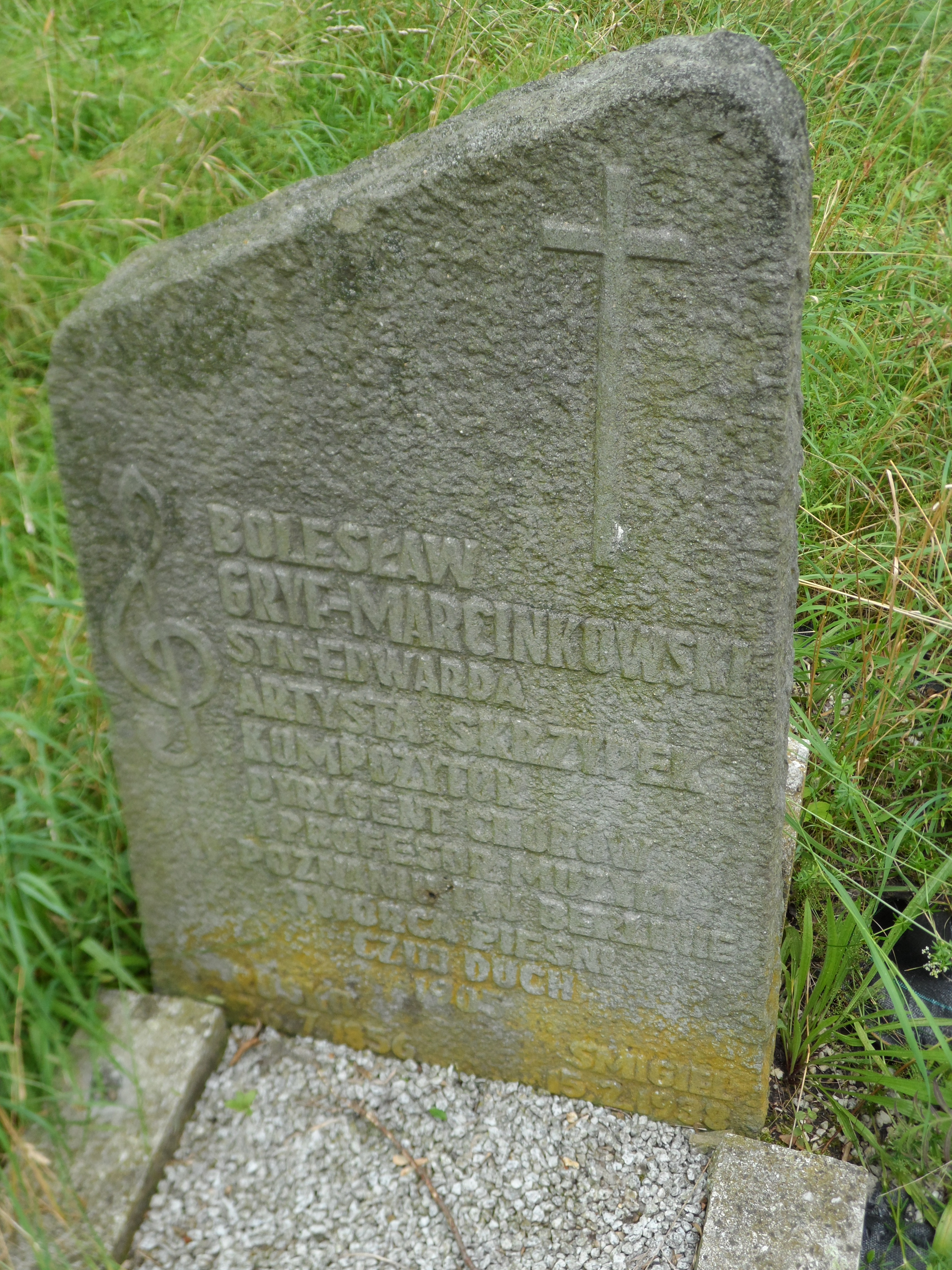 Nagrobek Bolesława Gryfa-Marcinkowskiego na cmentarzu przy ul. Samotnej w Poznaniu.